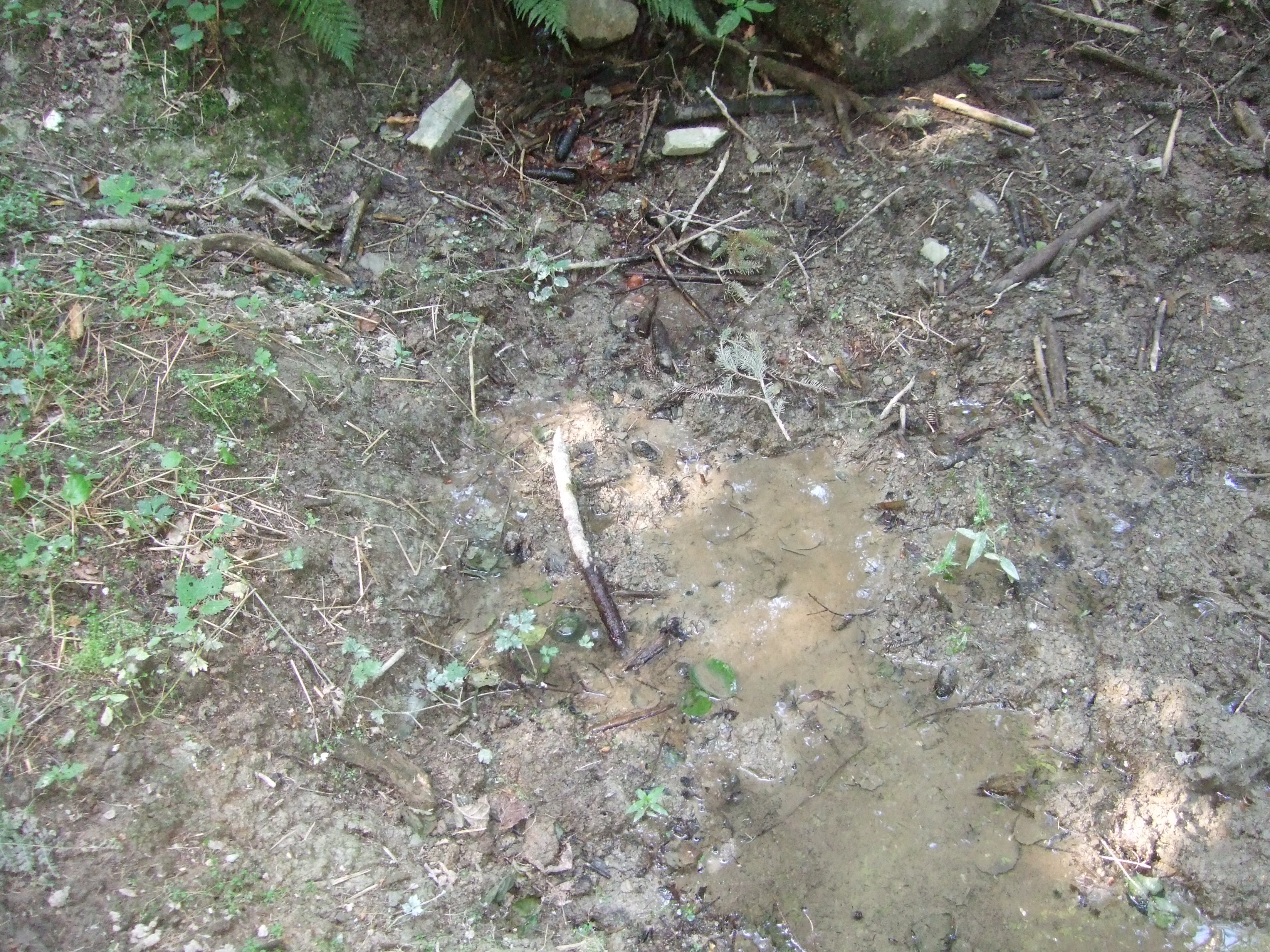 Usa-Quelle